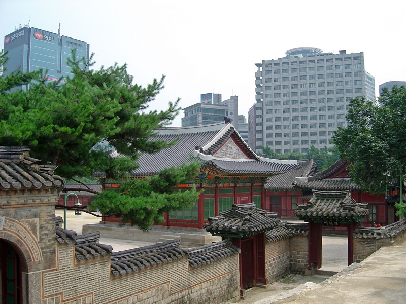 Deoksugung (Deoksu Palace)in Seoul, Korea.